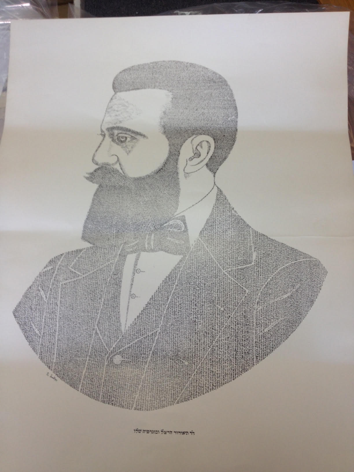 מיקרוגרפיה של הרצל, על פי ספרו של ראובן בריינין, חיי הרצל